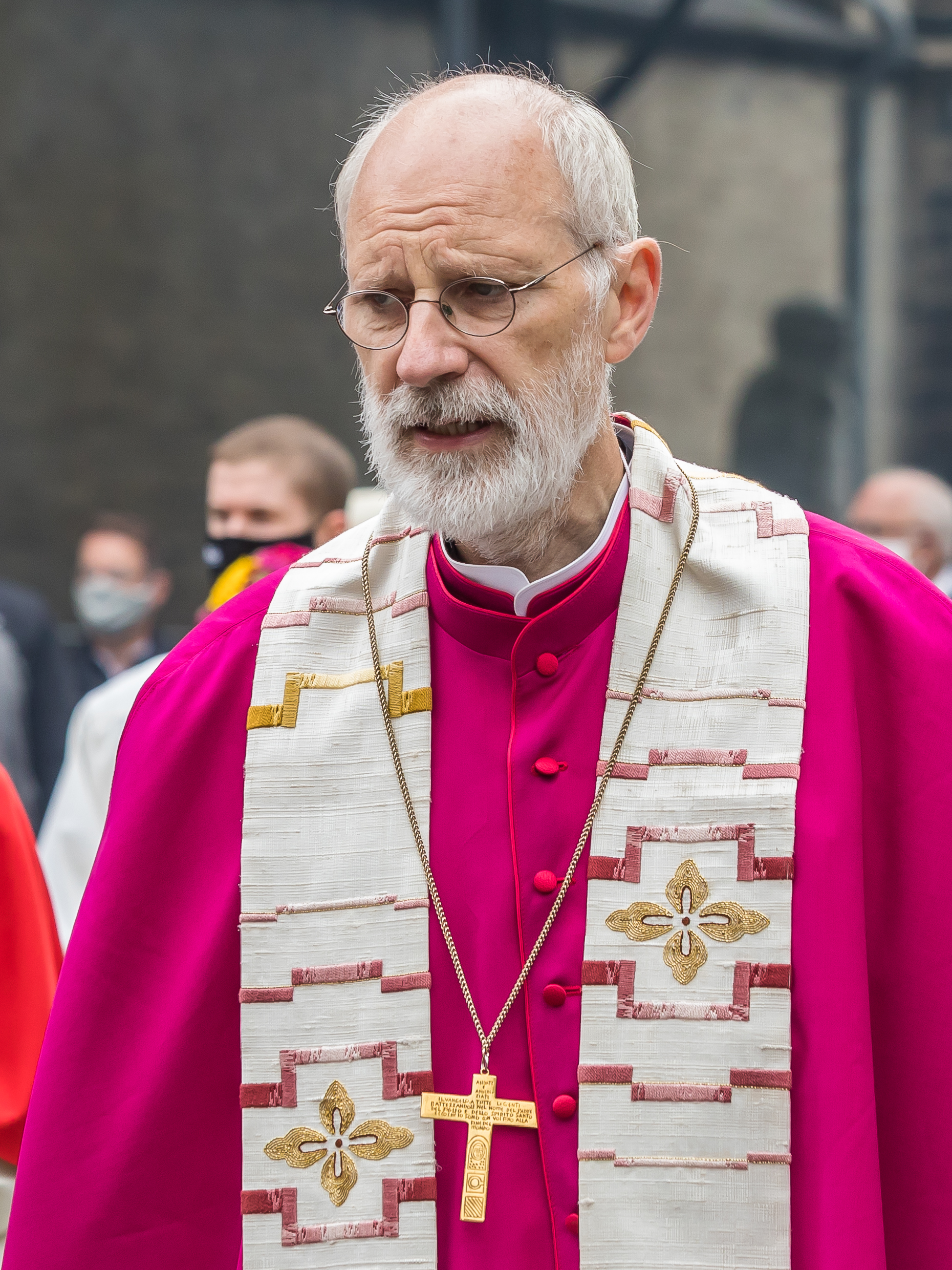 Fronleichnam Kölner Dom 2020